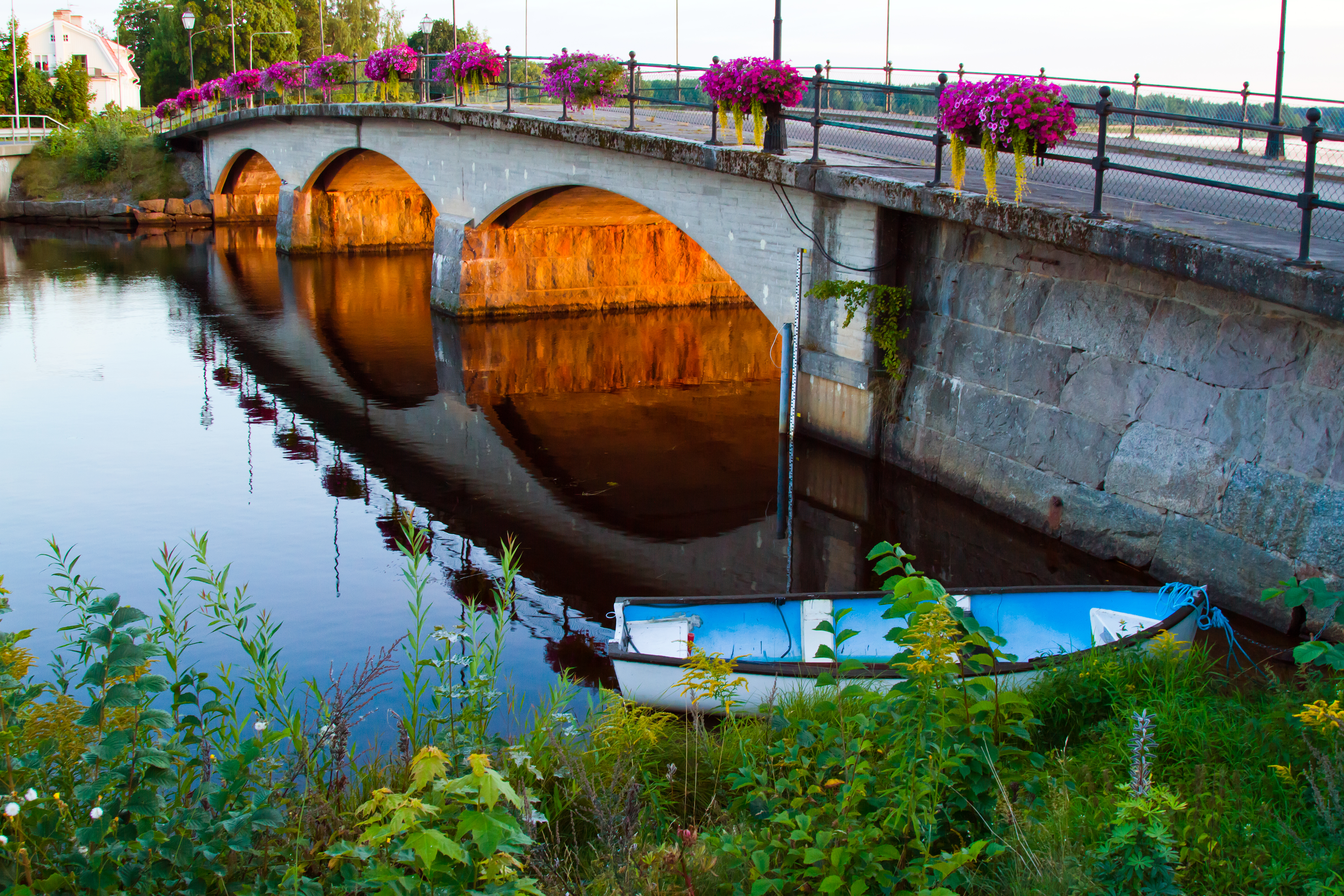 Gamla Sundsbron i Lindesbergs kommun, Sverige